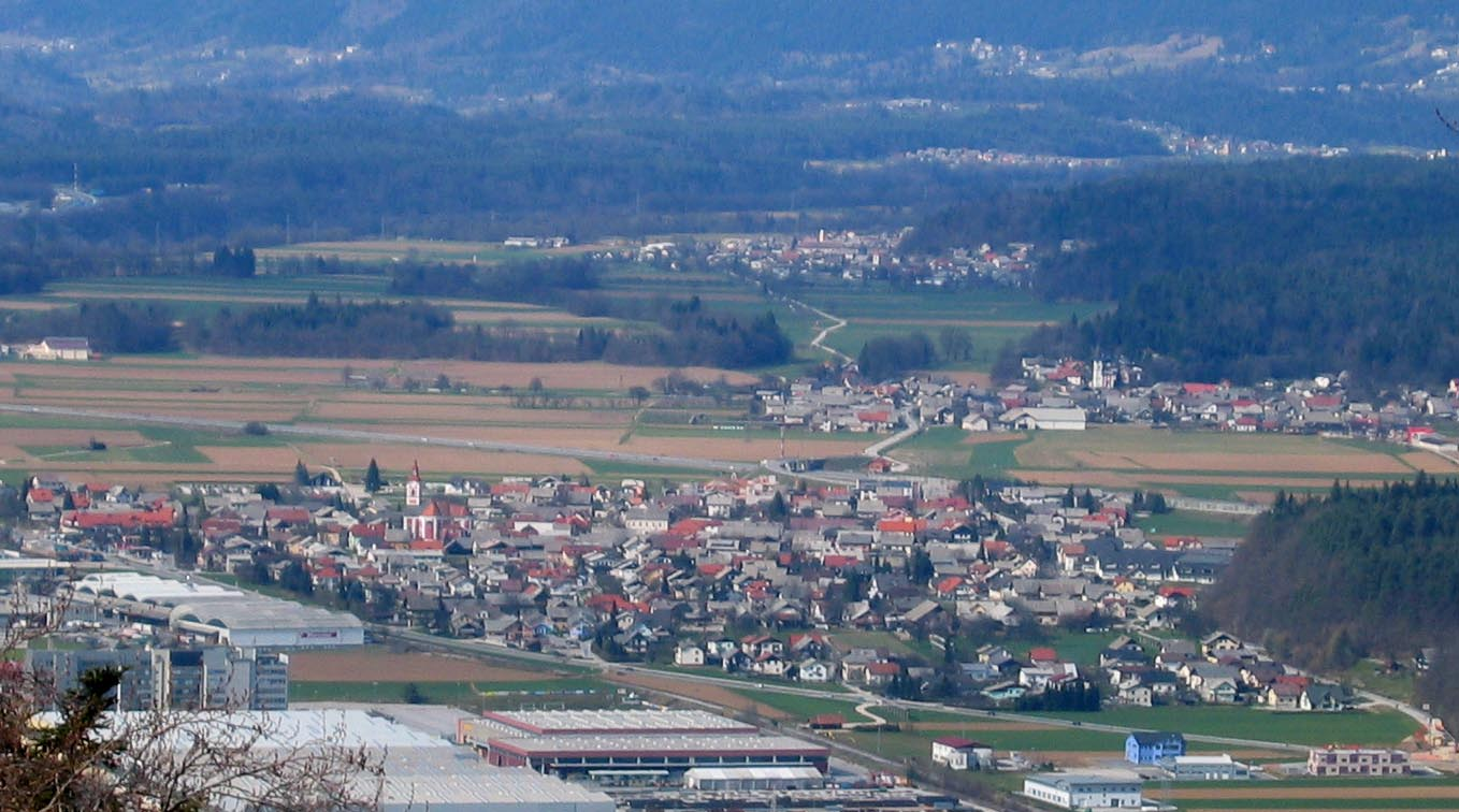 Naklo, a town near Kranj, Slovenia photo:Ziga 16:10, 11 March 2007 (UTC)